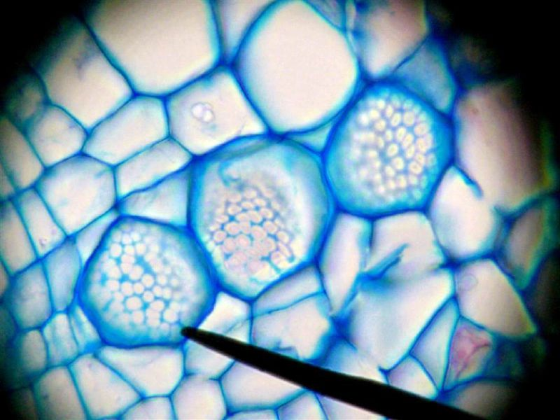 Cucurbita maxima. Elemento de tubo crivado transporta floema